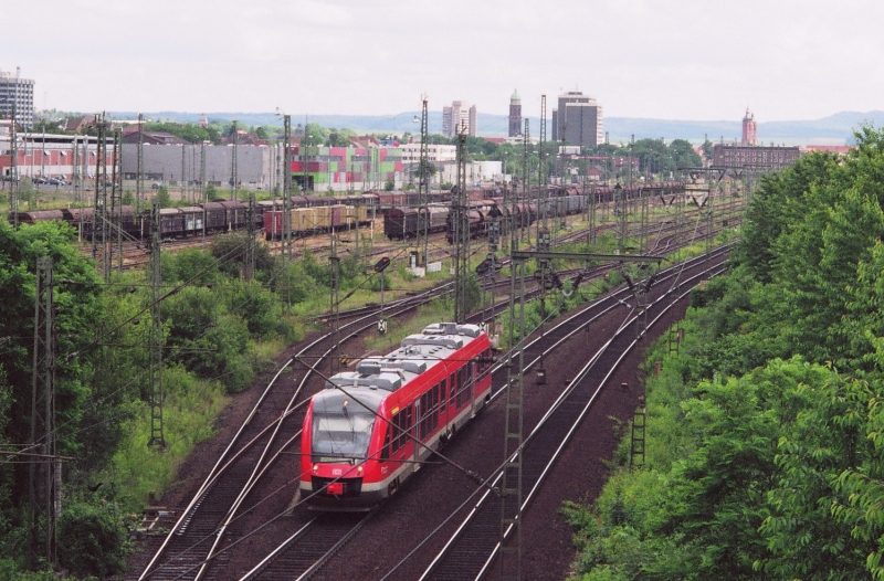 Triebwagen nach Nordhausen verlässt Göttingen. Im Hintergrund die Innenstadt. - Regional train leaving Goettingen, Germany